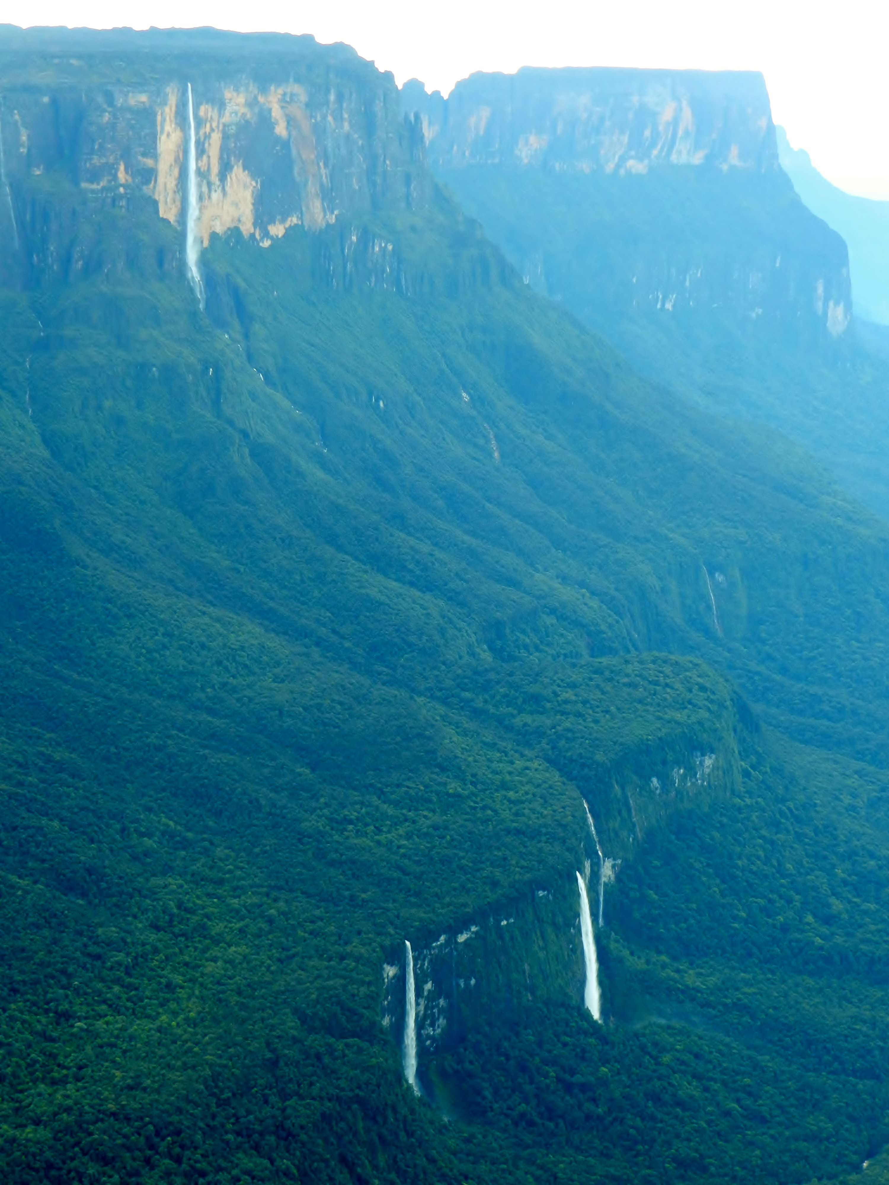 cachoeiras do tepui kukenan vistos a partir do monte roraima